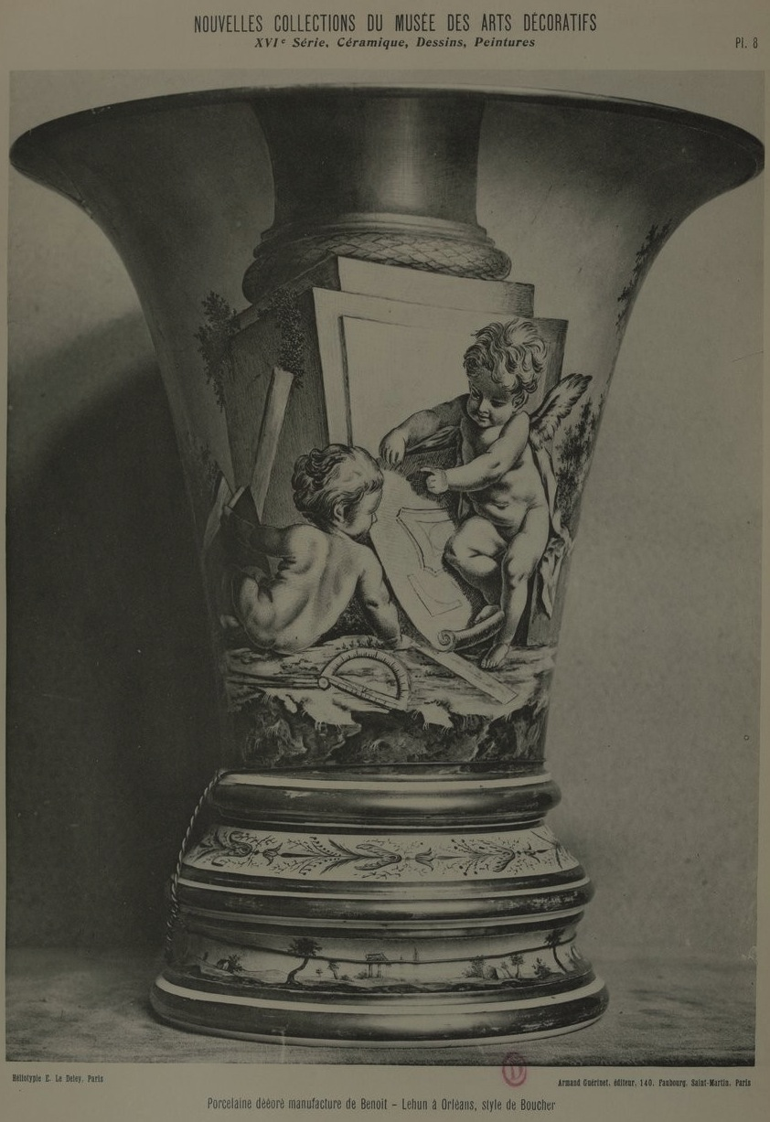 Porcelaine décorée, Manufacture de Benoit Lebrun, Orléans, France, style de Boucher